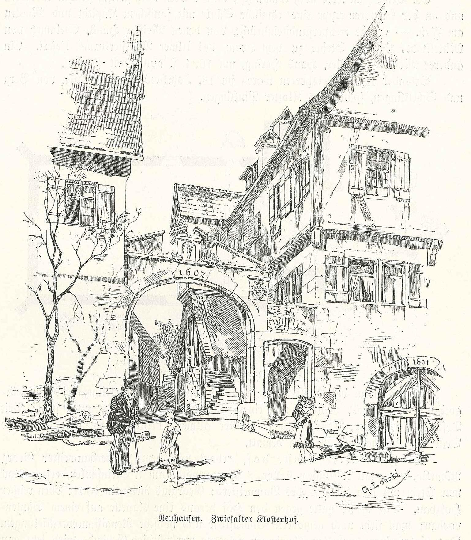 Neuhausen an der Erms Zwiefalter Klosterhof